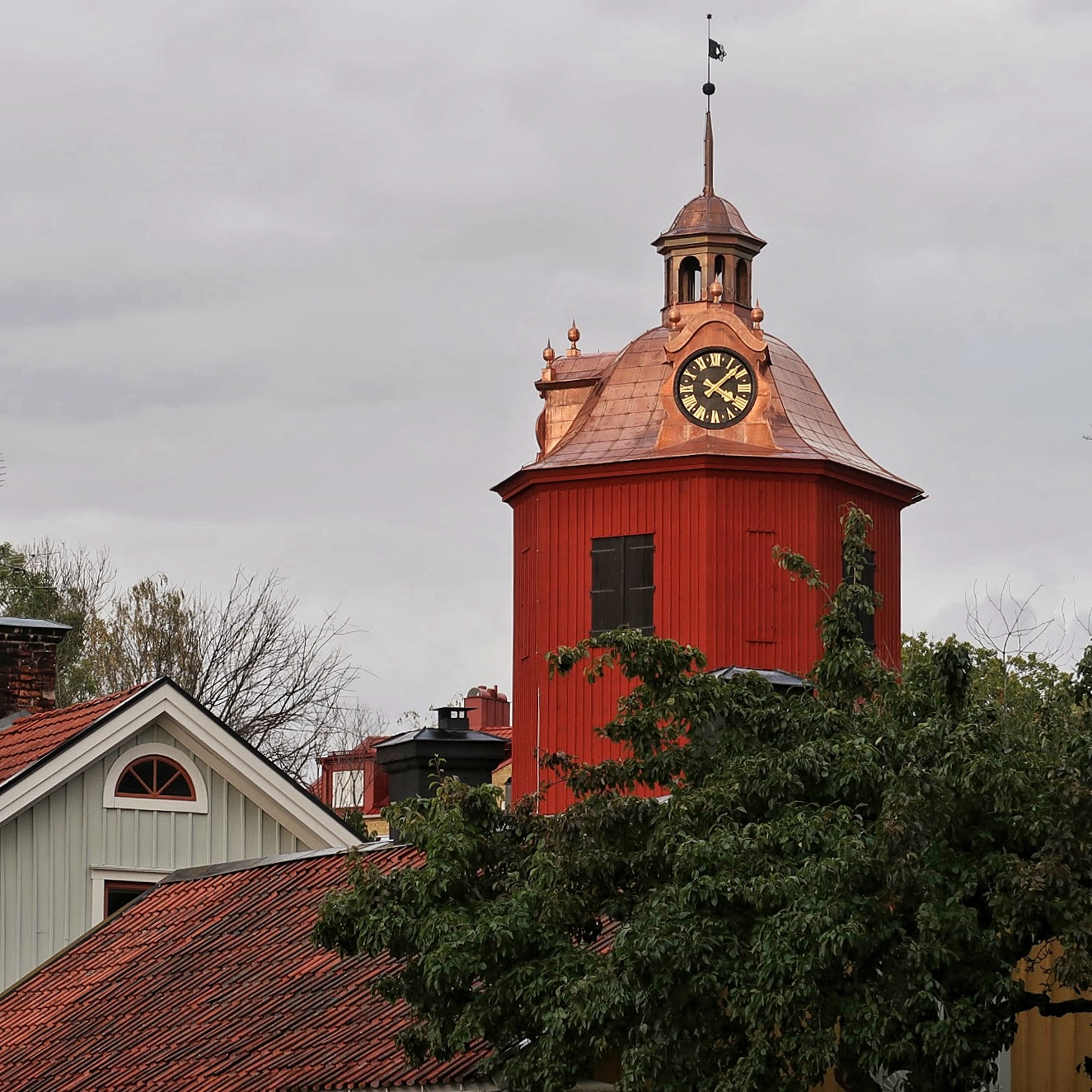 Nya Östra klocktornet i Nyköping invigdes den 29 september 1019.